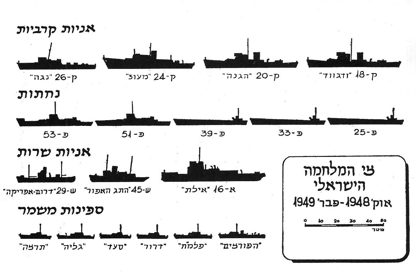 סדר הכוחות של חיל הים הישראלי במלחמת תש"ח.